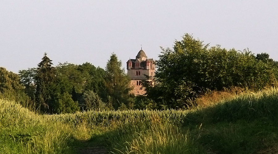 Kirchturm der evangelischen Kirche in Fronhausen. Erbauungszeit unbekannt, erste urkundliche Erwähnung 1259. Um den mittleren, großen Turm sind acht kleinere Türmchen angeordnet. Fotografiert von Timo Sack, Juni 2006